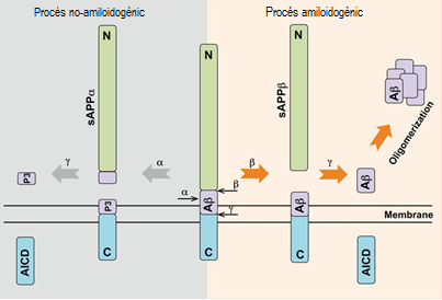 Formación del amiloide